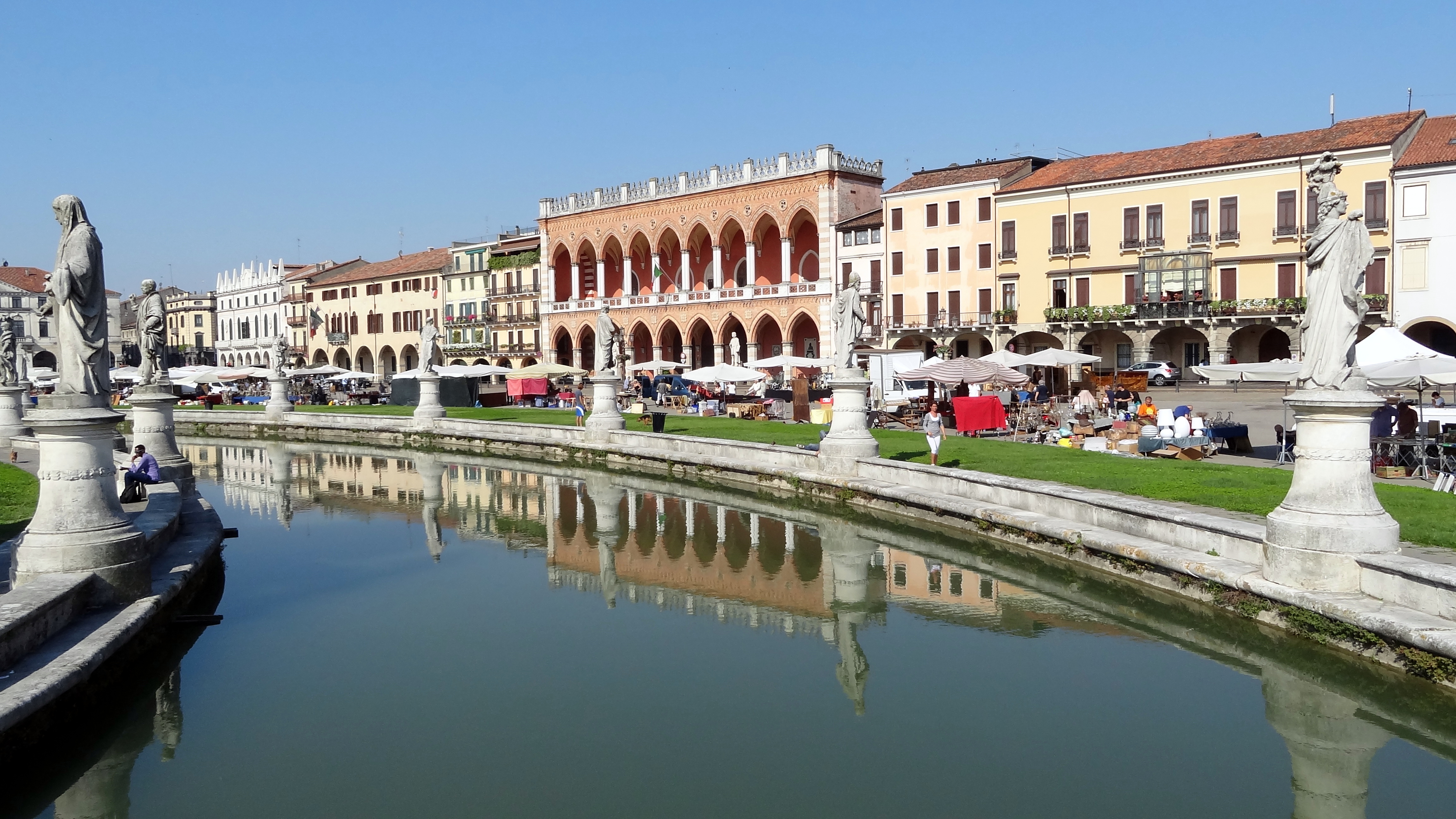 Prato della Valle